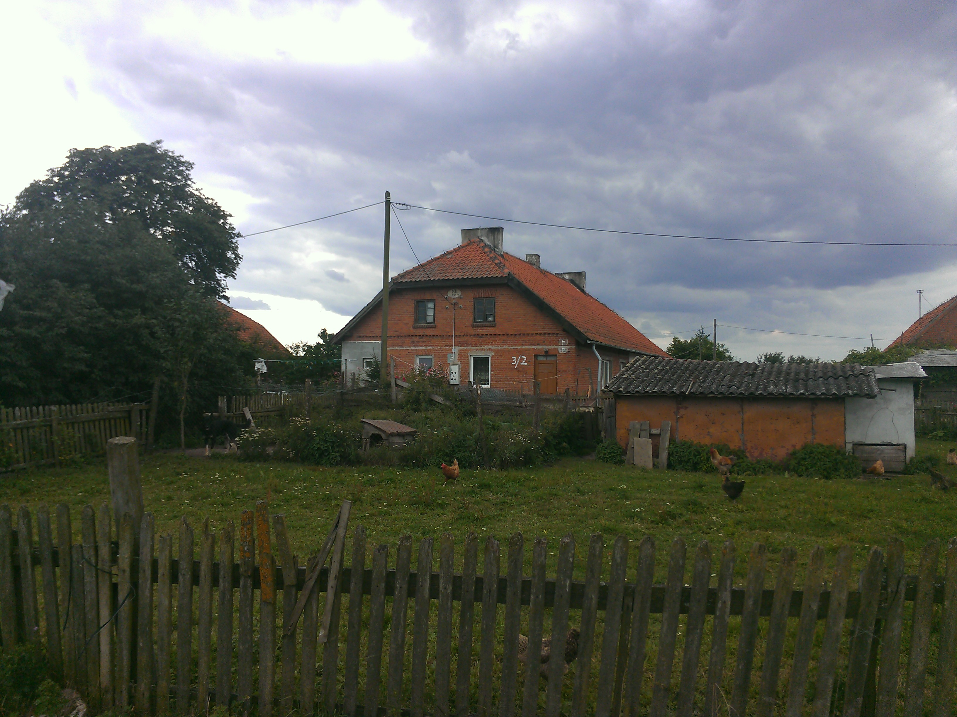 Deitsch: Selbst aufgenommen am 18,08,2014, frei verwendbar für jedermann. Kamień, ehemals Goldstein (?)